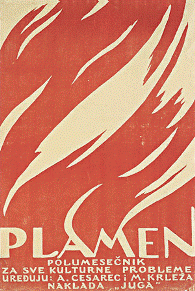 Srpskohrvatski / српскохрватски: Naslovnica časopisa "Plamen" Miroslava Krleže iz 1919.